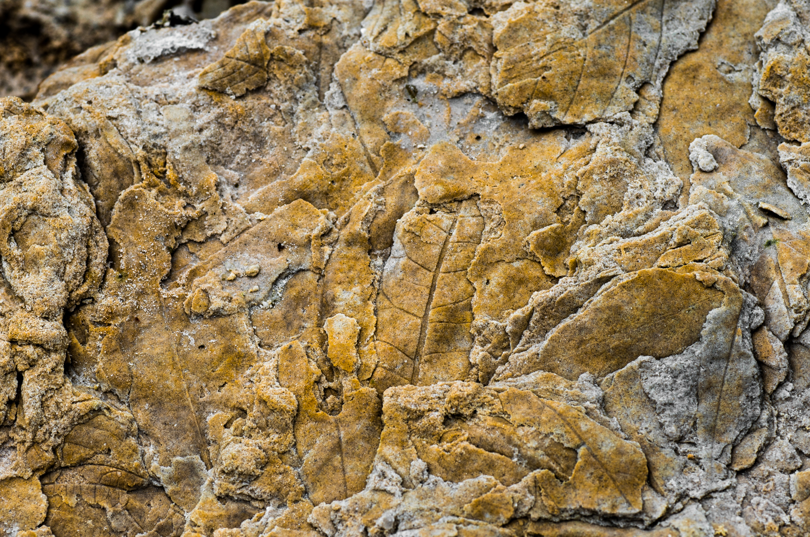 Pískovna Erika, Evropsky významná lokalita, okres Sokolov